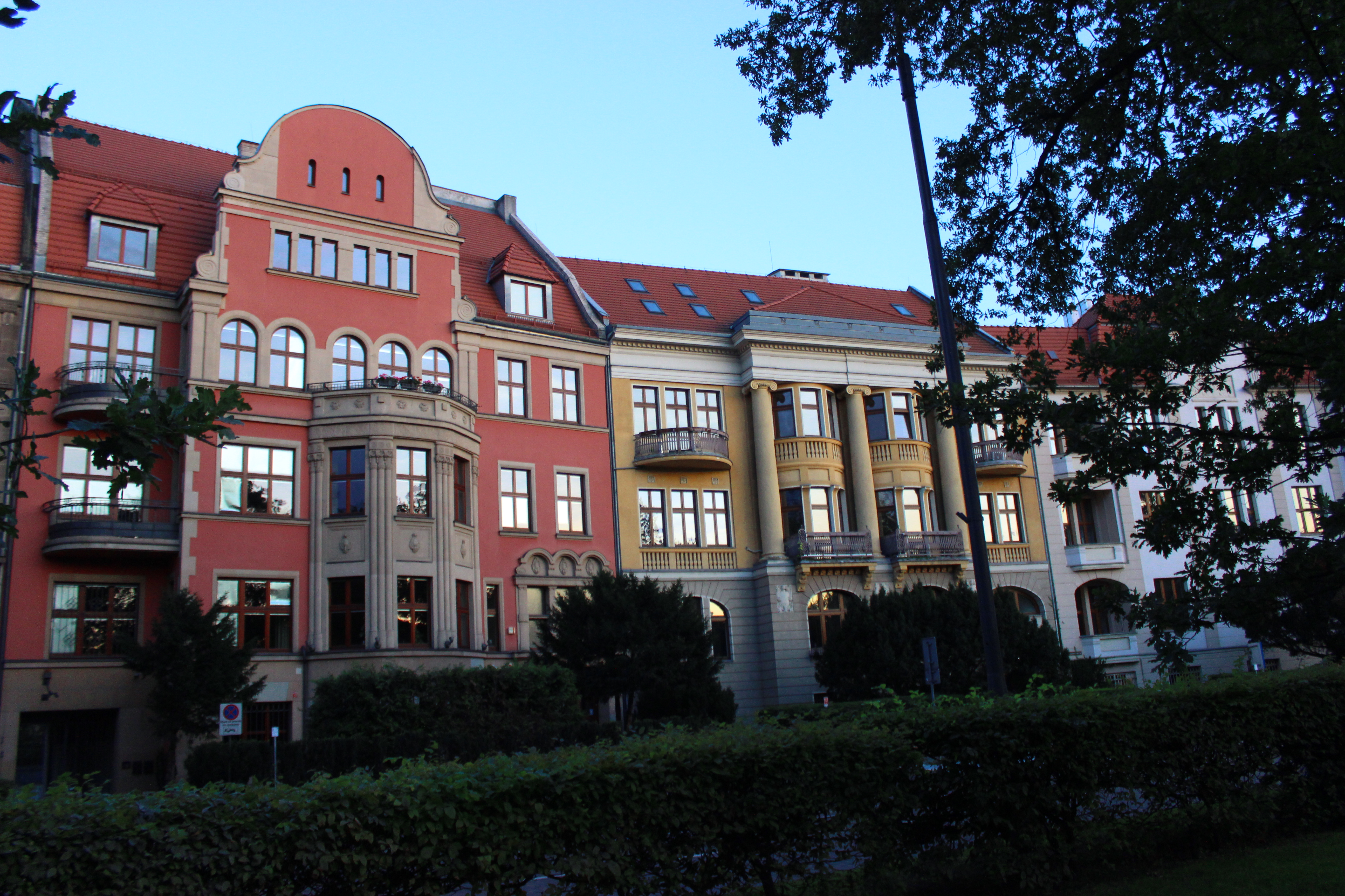 Wrocław, pl. Powstańców Śląskich 11 Wikidata has entry Q30075581 with data related to this item.